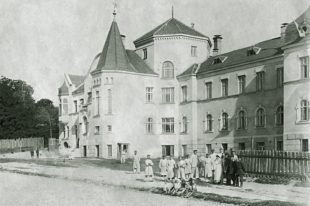 Лікарня лютеранської громади, Київ, вул. Винниченка, 9